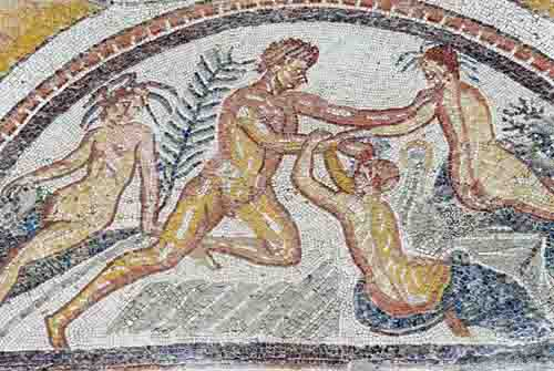 Detalle del mosaico de Las Metamorfosis, Villa Romana de Carranque